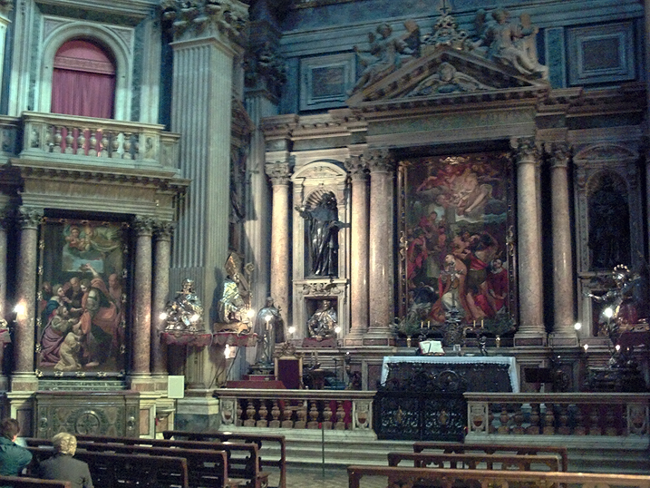 Parte dell'interno della Reale Cappella del Tesoro di San Gennaro (Napoli). A destra la tela del Domenichino del 1640 raffigurante la Decapitazione di San Gennaro.